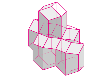 菱形台形十二面体